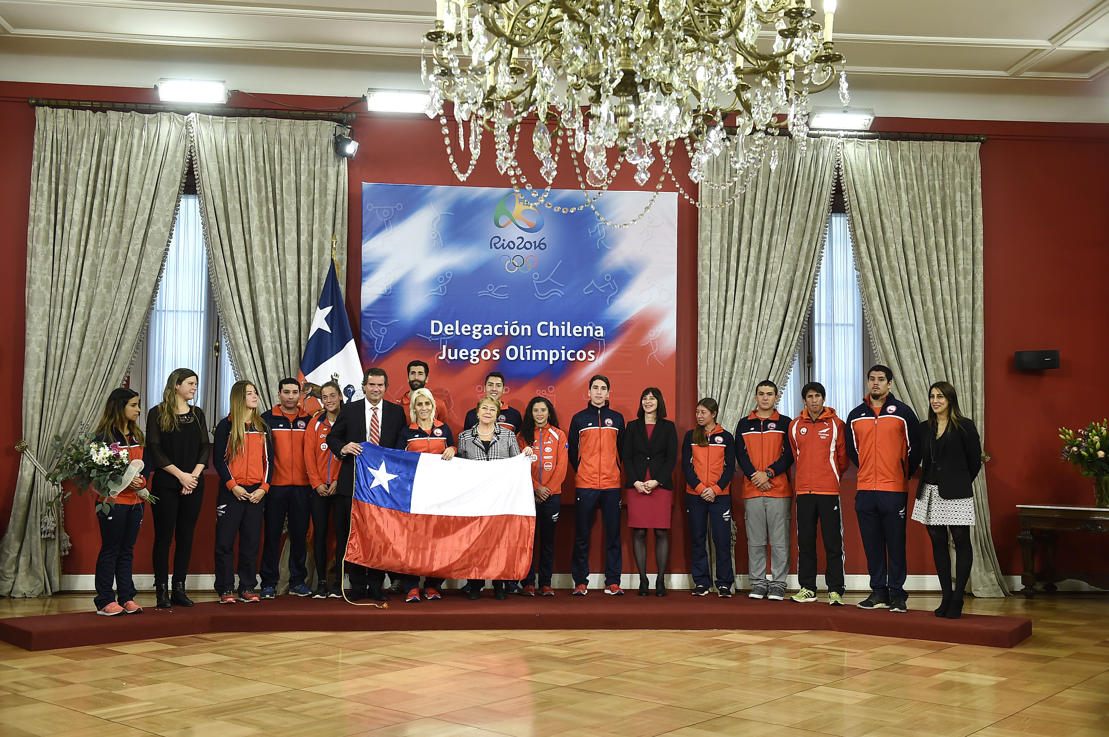 Gobierno de Chile